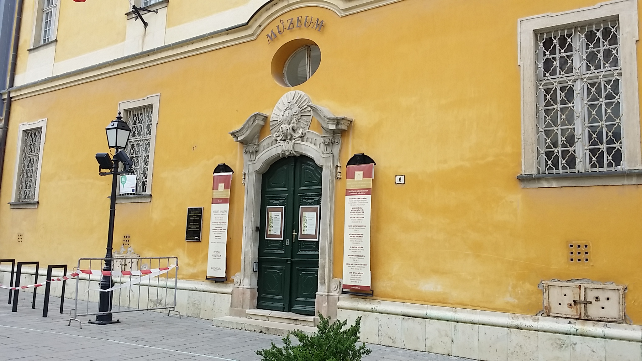 Székesfehérvári Egyházmegyei Múzeum. - Székesfehérvár, Fő u. 6 / Városház tér 4 Object location47° 11′ 29.2″ N, 18° 24′ 34.12″ E